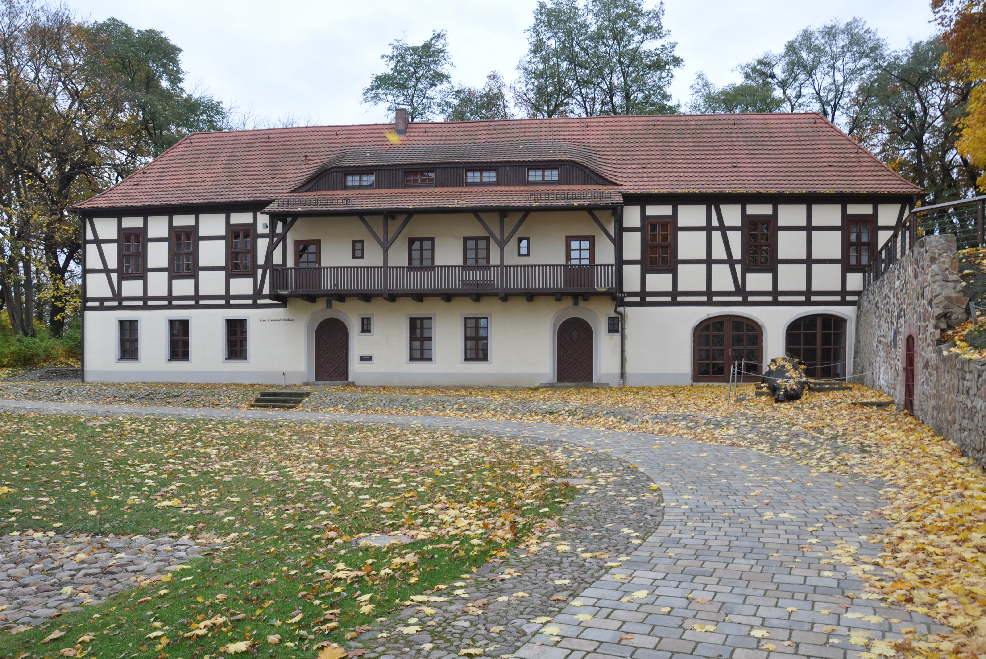 Senftenberg (Brandenburg), Schloss, Kommandantenhaus